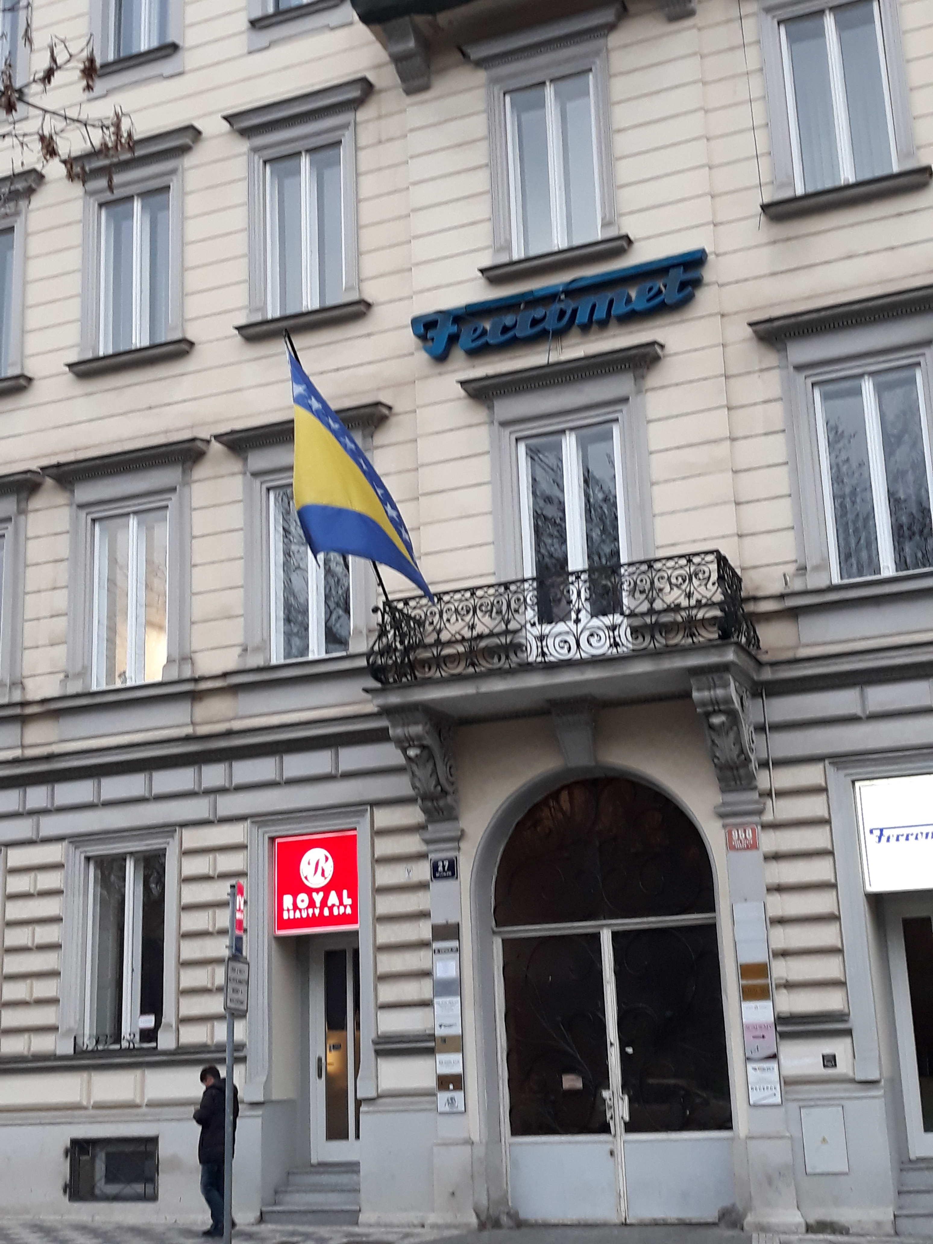 Objekat u Pragu u kojem se nalazi Ambasada Bosne i Hercegovine u Češkoj Republici